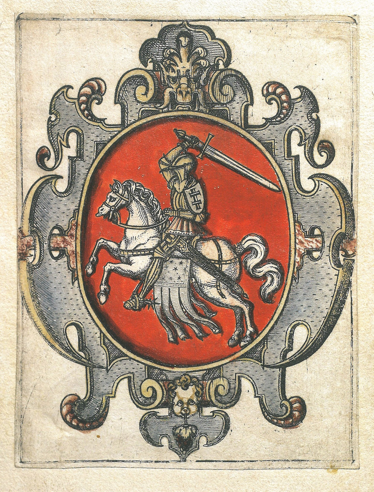 Беларуская (тарашкевіца): Герб Пагоня (Pahonia) з рукапіснага гербоўніка Эразма Коміна (Erasmus Kamyn; 1575)